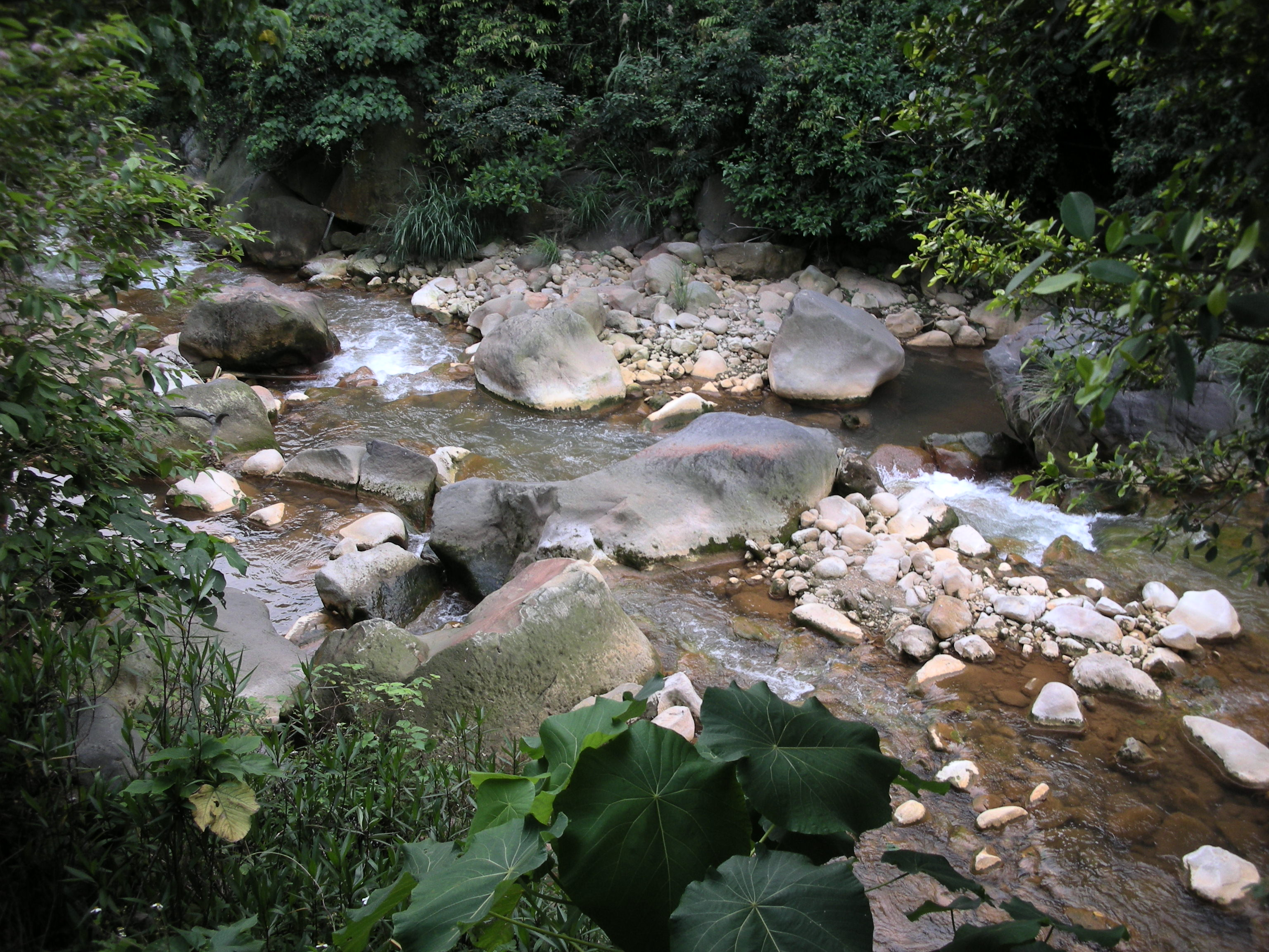 天母公園Tianmu Park